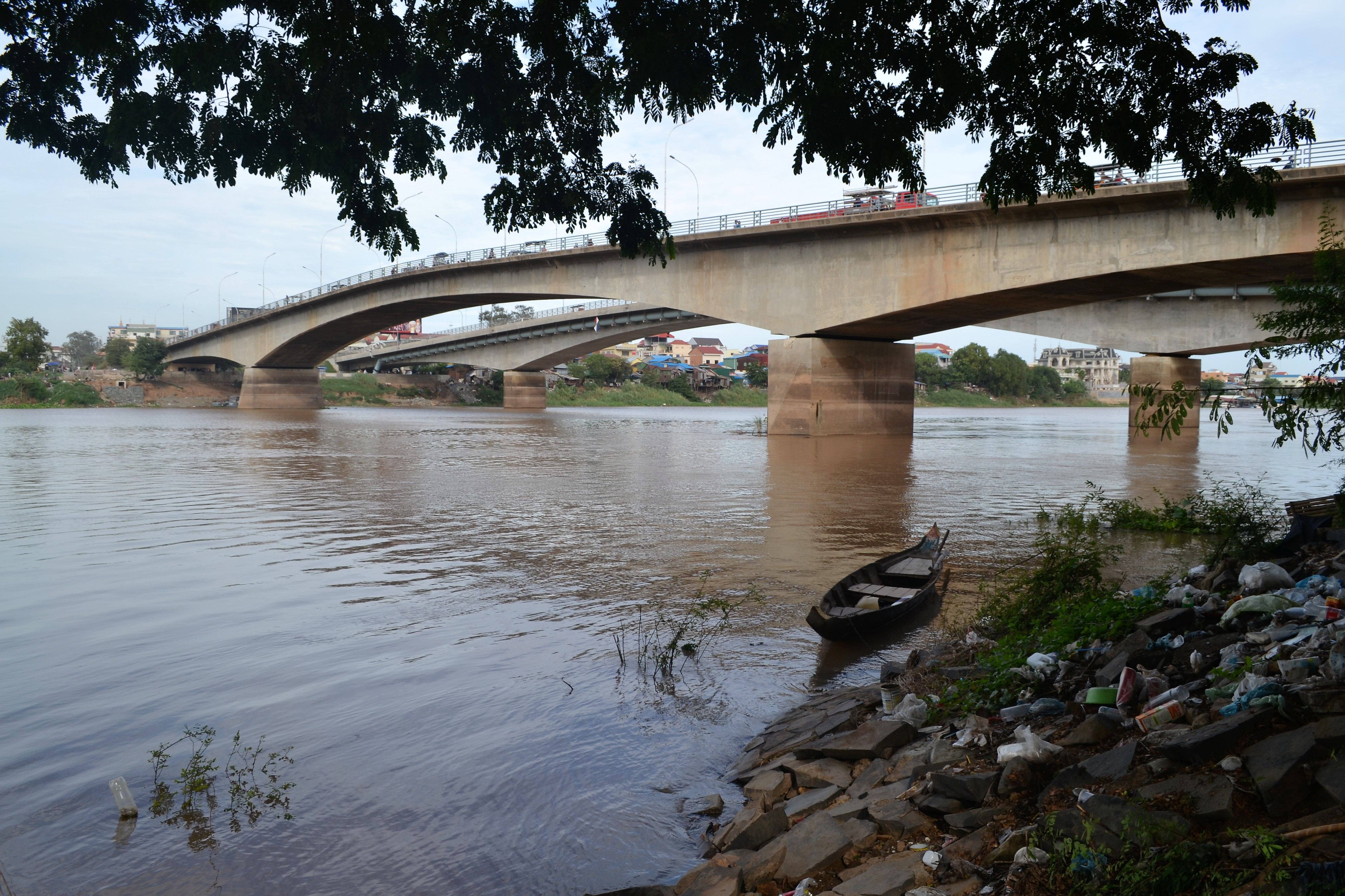 vue côté nord